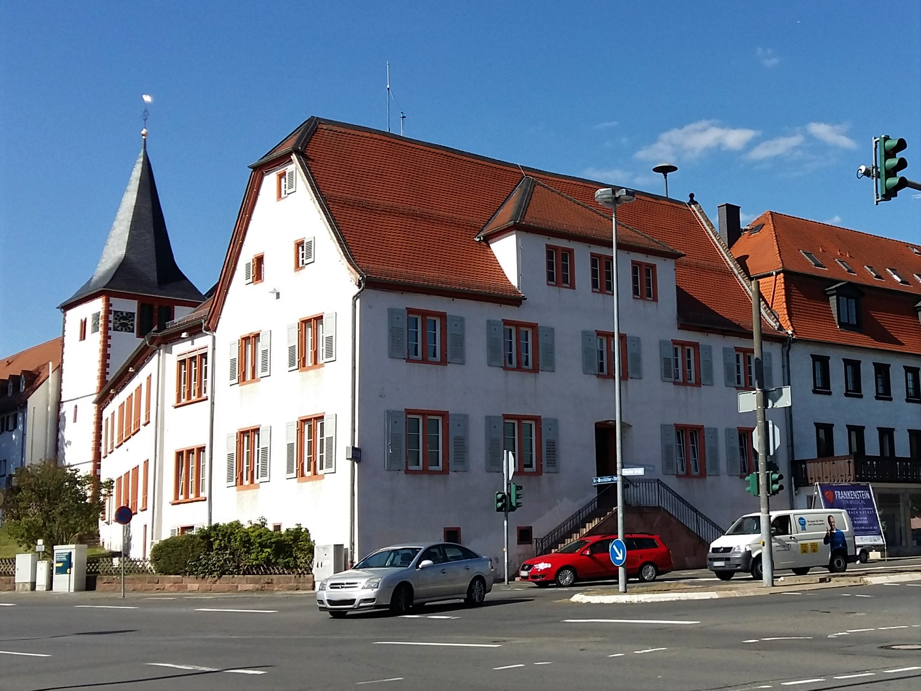 Ehemaliges Zenthaus und Amtsgericht, heute Polizeistation in der Aschaffenburger Straße 2 in Höchst im Odenwald von Süden (September 2018).